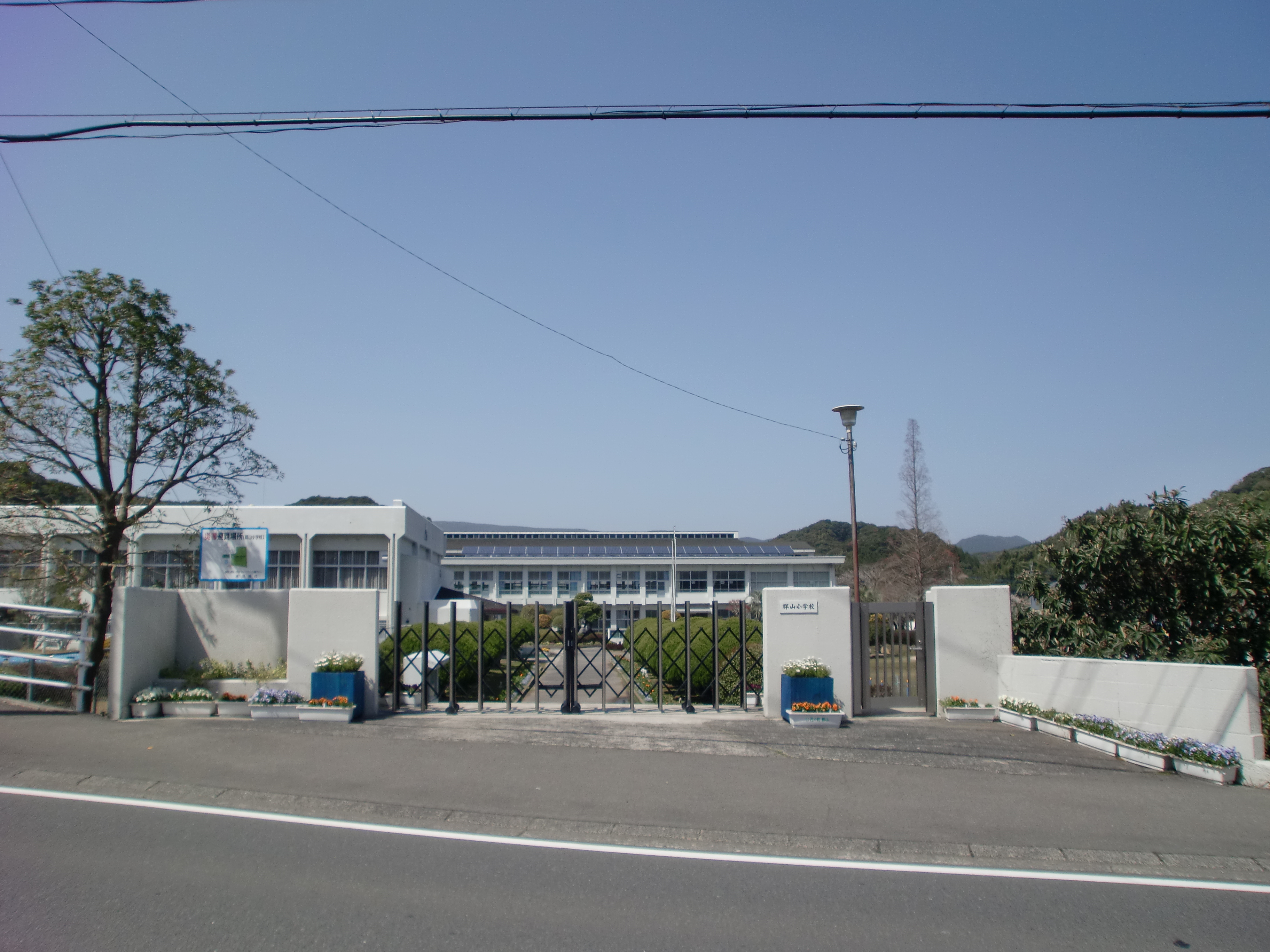 鹿児島市立郡山小学校の外観。